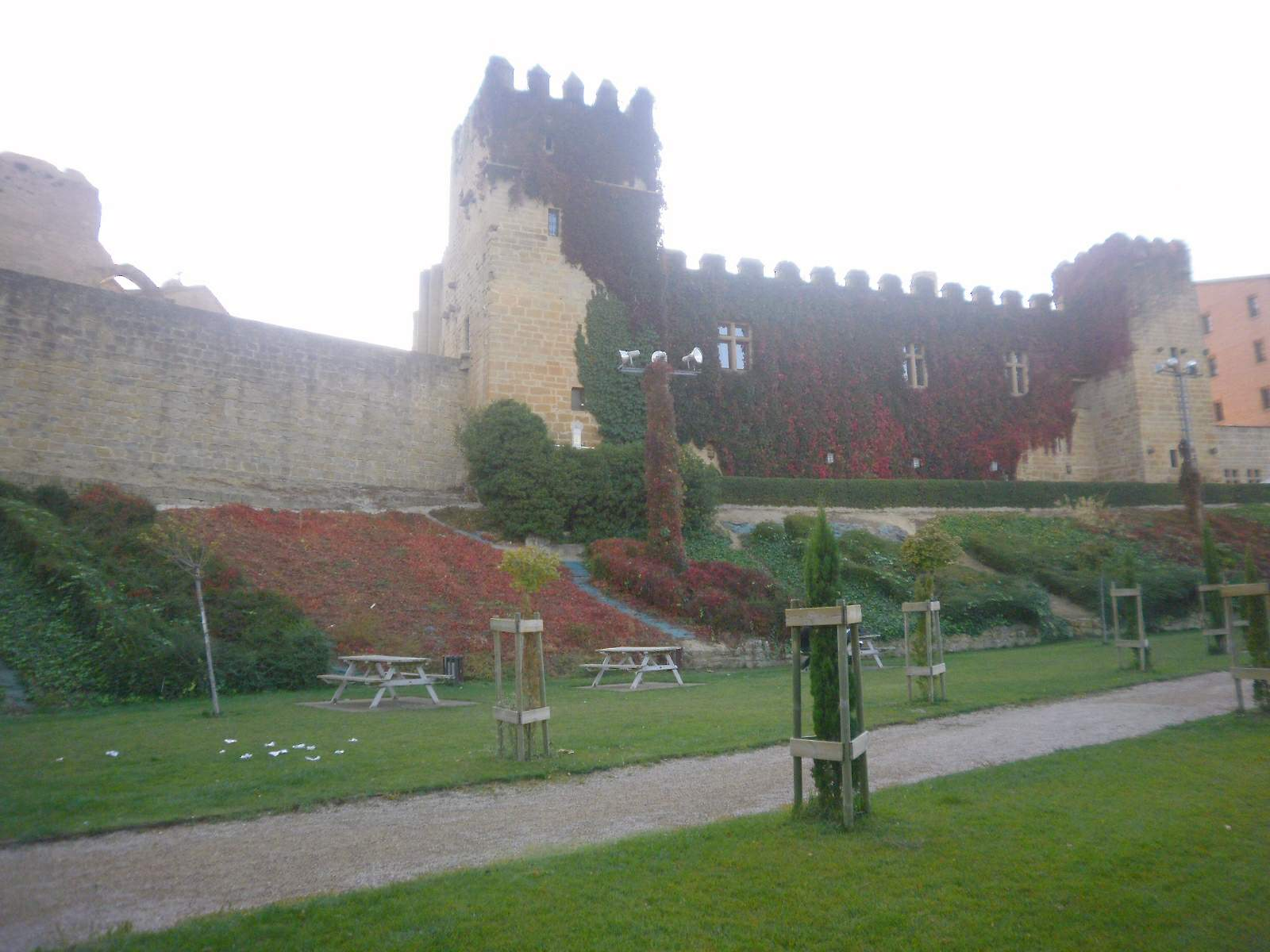 Castillo Viejo-Parador Nacional Principe de Viana (Olite, Navarra)